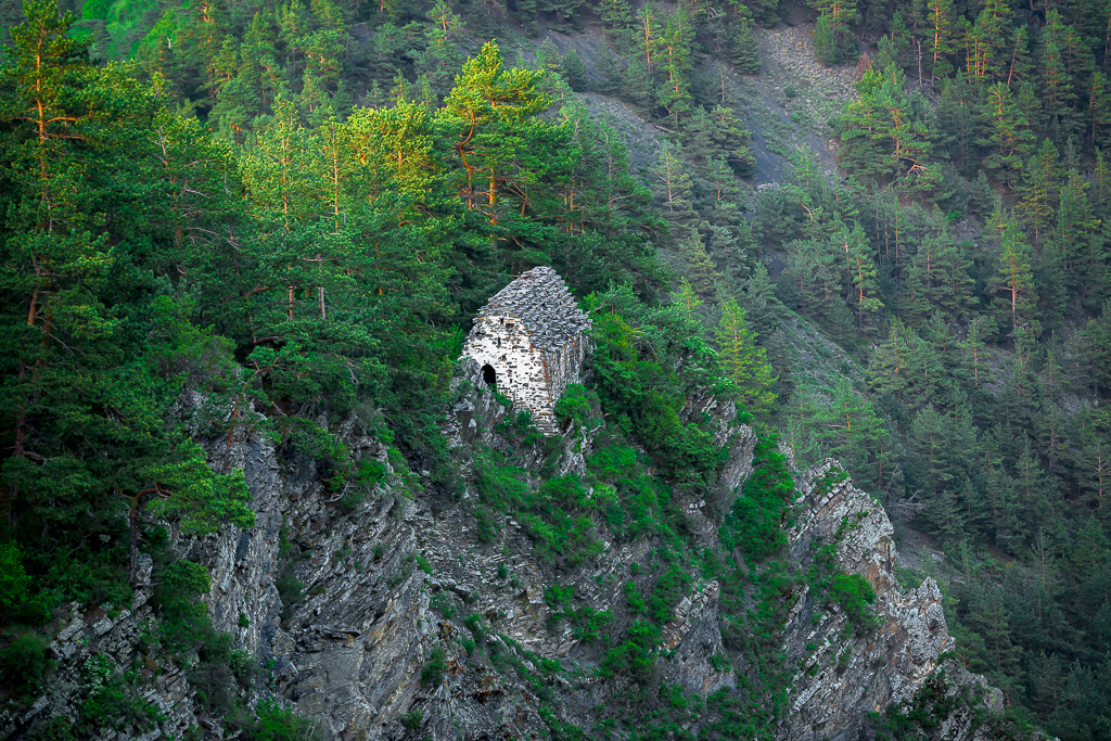 Древний ингушский храм Маго-Ерды